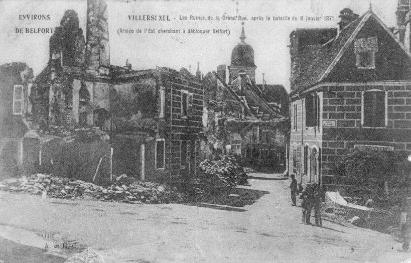 Bataille de Villersexel Vue des destructions du bourg vers l'Ognon Carte postale non datée